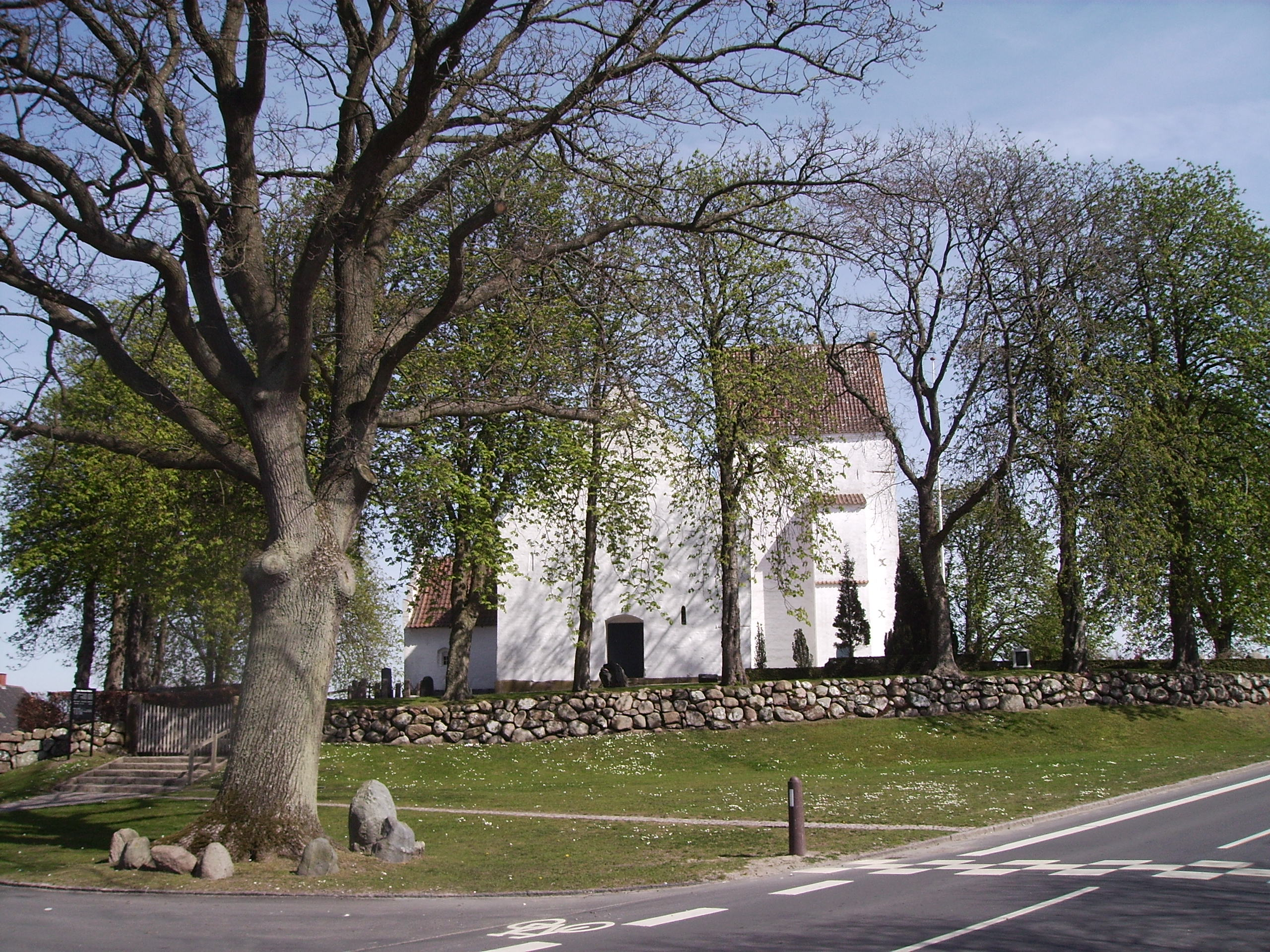 Sankt Mikaels Kirke, Sønder Nærå Sogn, Åsum Herred, Odense Amt, Denmark (Danish Church) - Sankt Mikaels Kirke fra vest